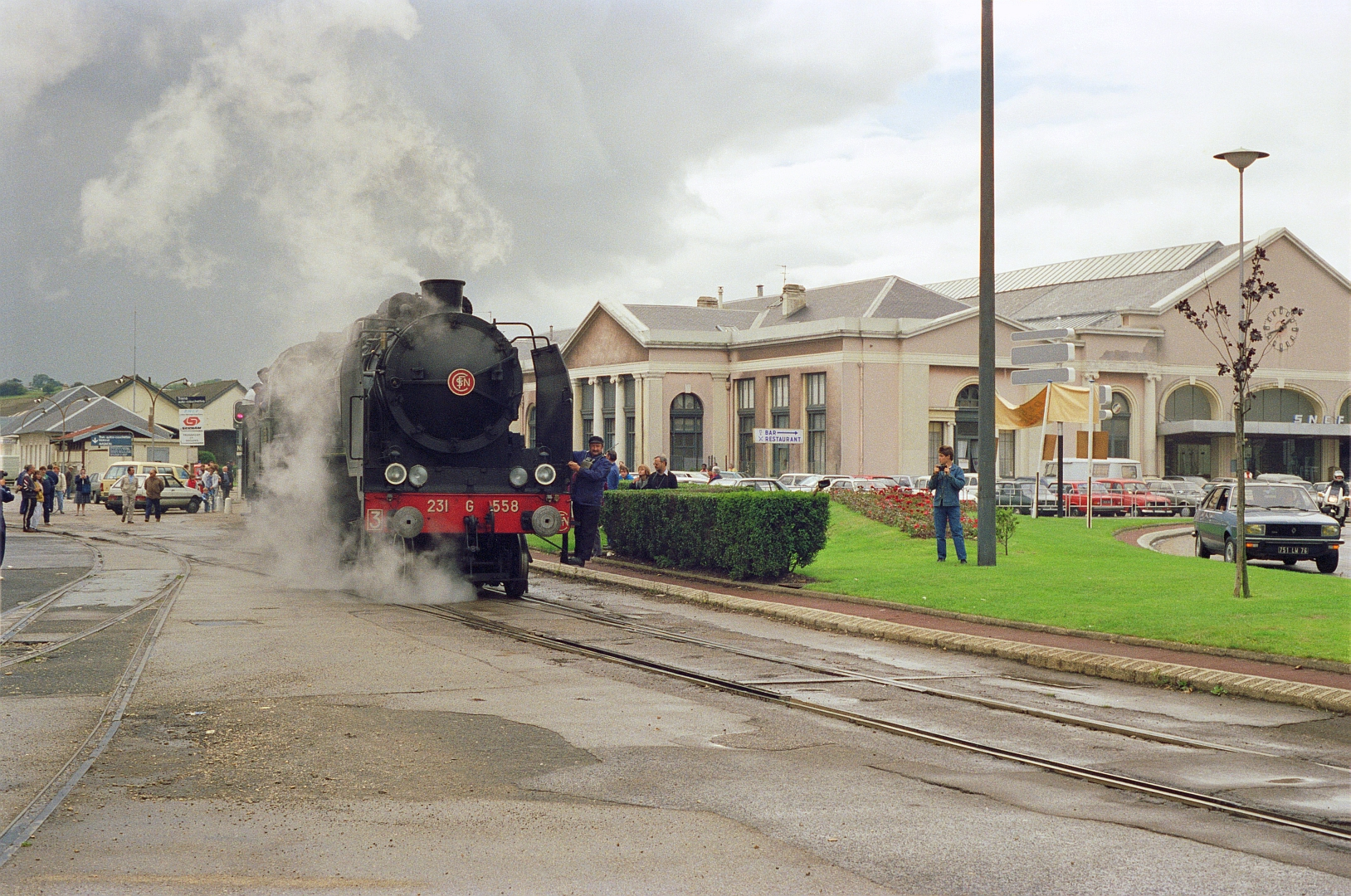 Un train tracté par la 231 G 558 quitte la gare de Dieppe et s'engage sur la voie qui mène à la gare de Dieppe-Maritime, le 14 septembre 1986.